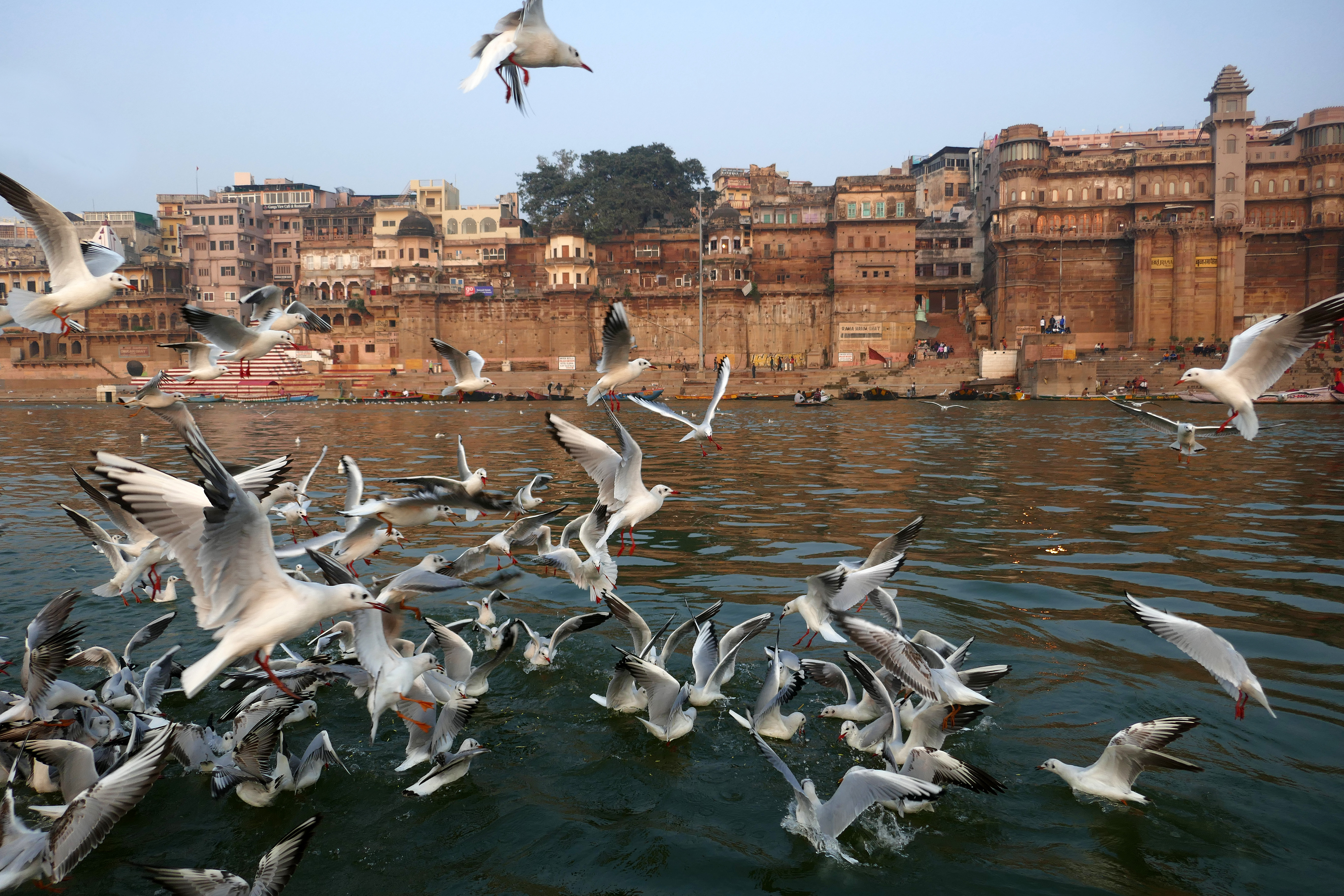 Oiseaux migrateurs sur le Gange à Bénarès.